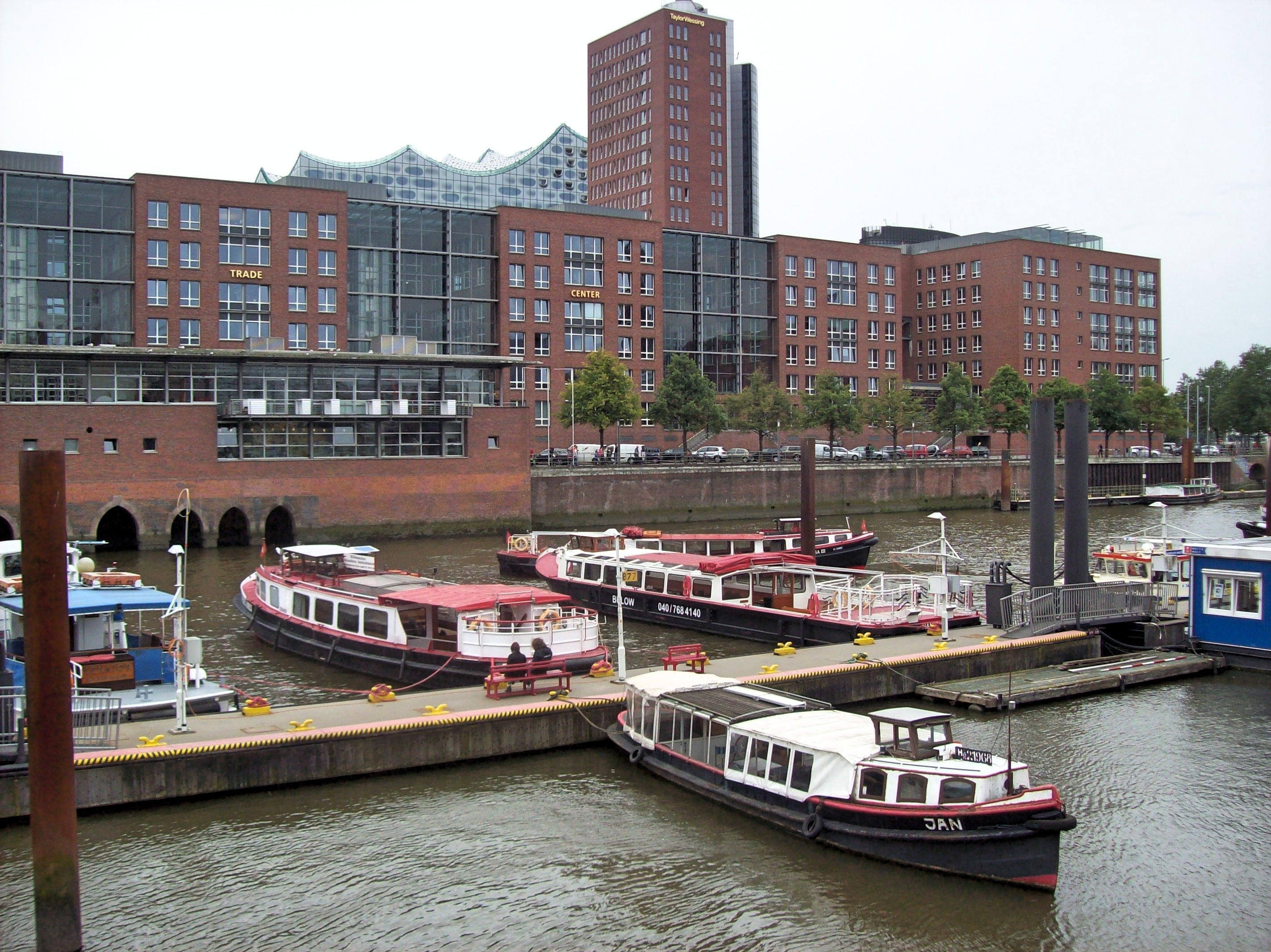 Hanseatic Trade Center mit dem Binnenhafen.